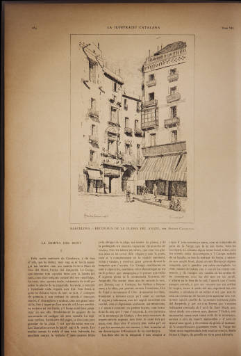 Ilustració Catalana, primera època, número 143 Data: 30 de Juny de 1886 pàg. 384